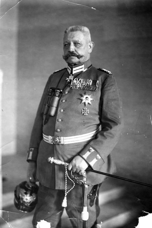 Paul v. Hindenburg ADN-ZB Generalfeldmarschall Paul von Beneckendorf und Hindenburg geboren: 2.10.1847 in Posen gestorben: 2.8.1934 in Neudeck (Ostpreußen) deutscher Heerführer im I. Weltkrieg und Reichspräsident der Weimarer Republik seit 1925. [Porträt Paul von Hindenburg] Abgebildete Personen: Hindenburg, Paul von Beneckendorff und von: Reichspräsident, Generalfeldmarschall, Deutschland (GND 118551264)